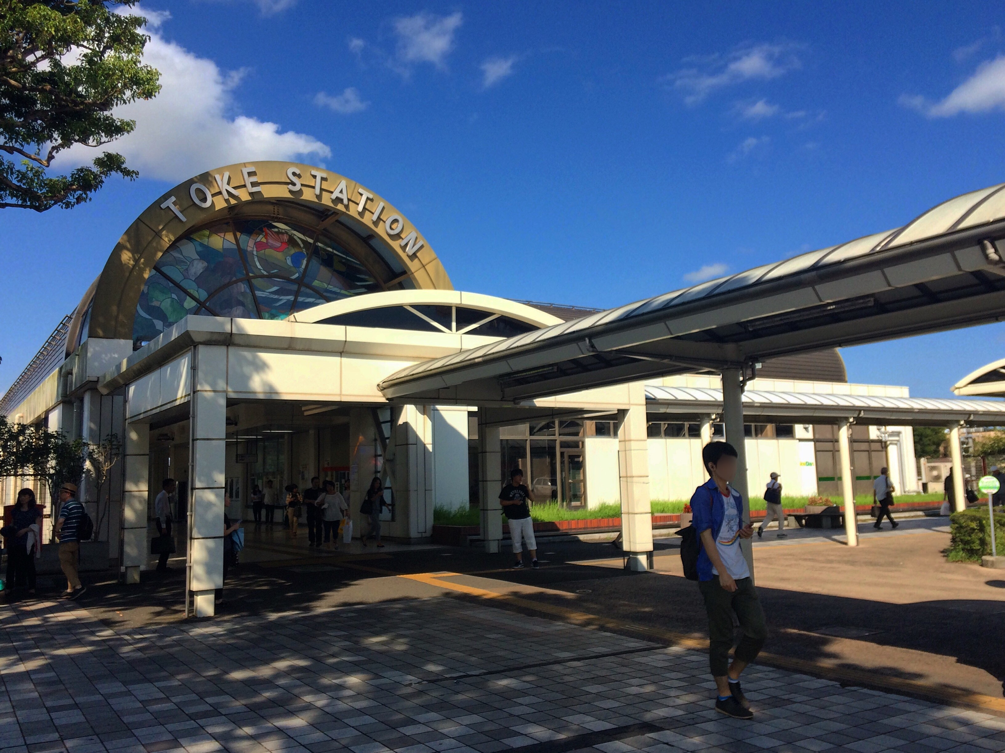 土気駅南口駅舎